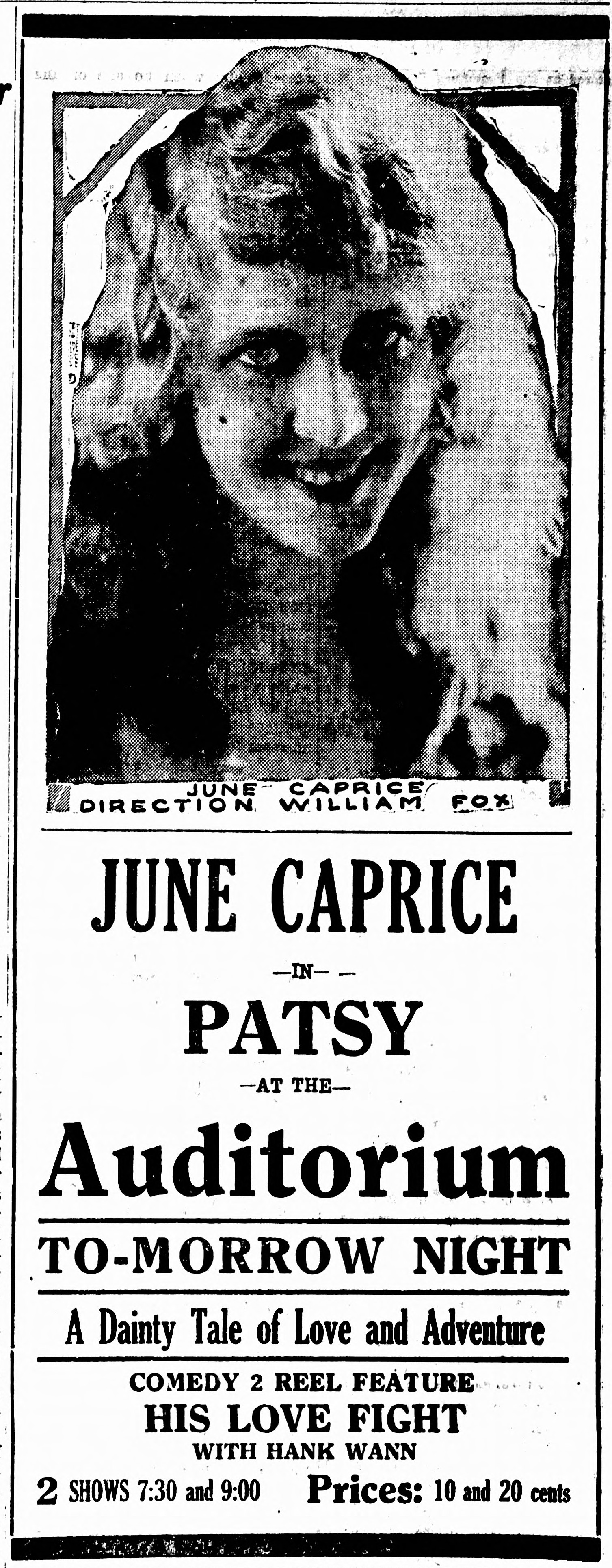 Patsy advert